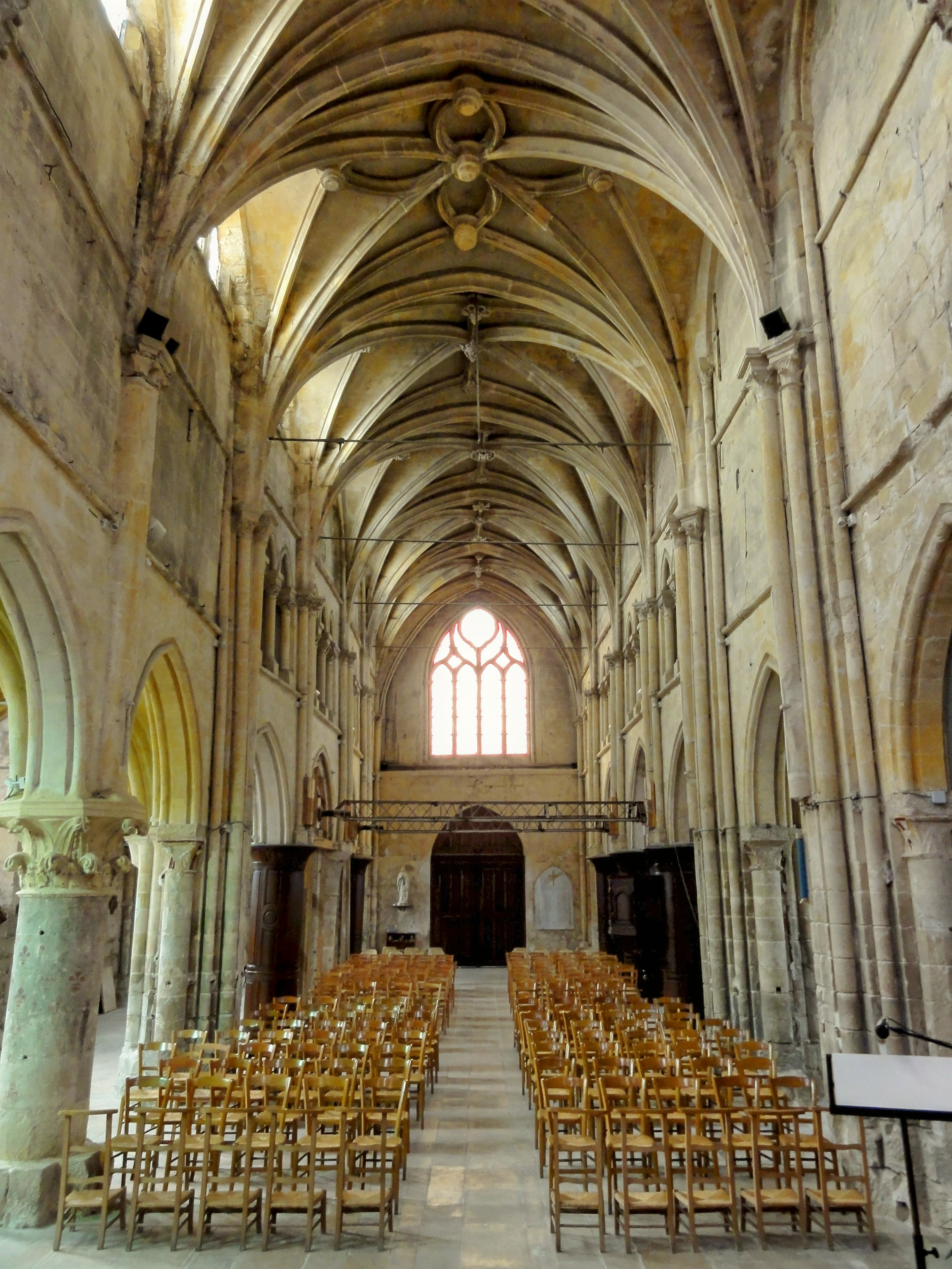 Vue générale intérieure depuis l'autel.